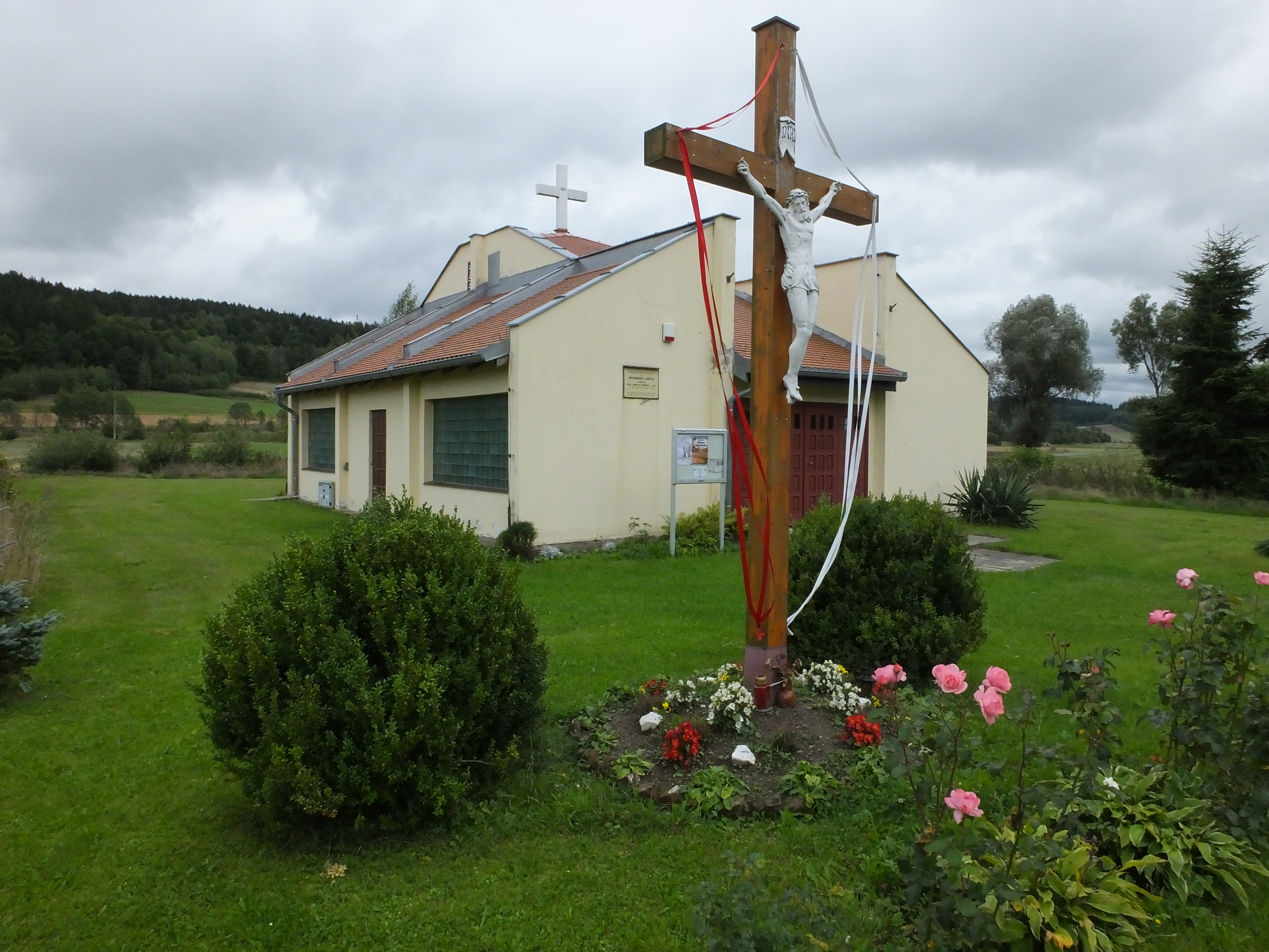 Kaplica w Janiszowie k/Kamiennej Góry